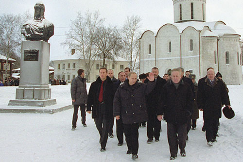 ПЕРЕСЛАВЛЬ-ЗАЛЕССКИЙ, ЯРОСЛАВСКАЯ ОБЛАСТЬ. Посещение Спасо-Преображенского собора.